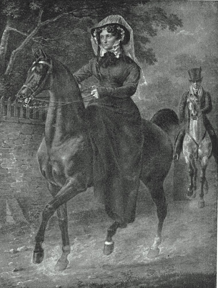 Св. княгиня Анна Ивановна Лопухина (1786—1869)